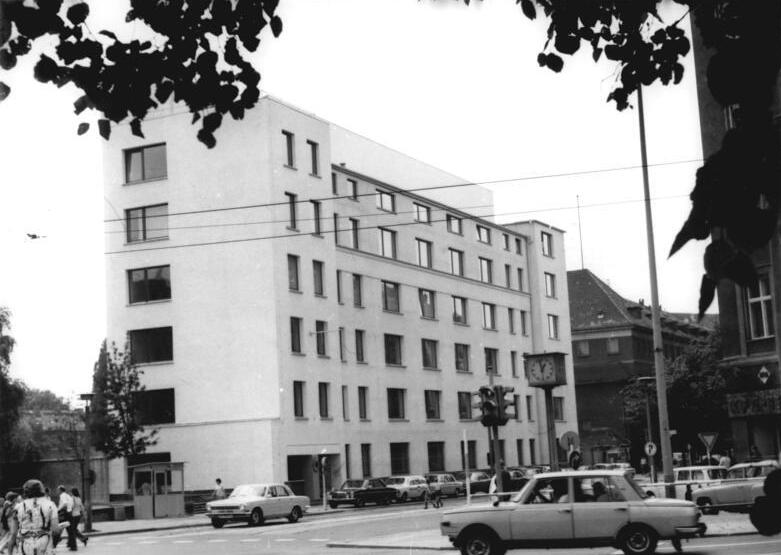 ADN-ZB Link 25.6.1974 Berlin: Blick auf das Gebäude der Ständigen Vertretung der BRD in der DDR in der Hannoverschen Straße von Berlin.